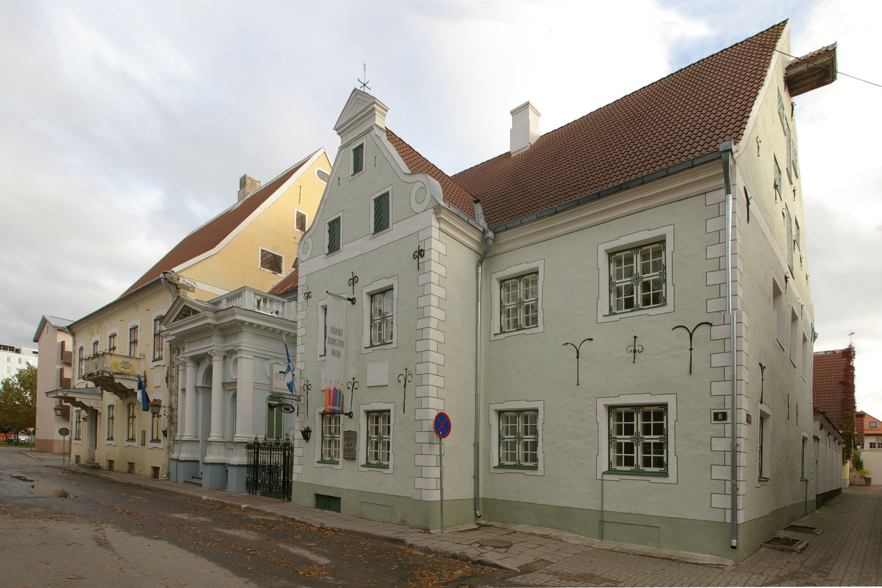 Pühavaimu 8, Kunstide Maja